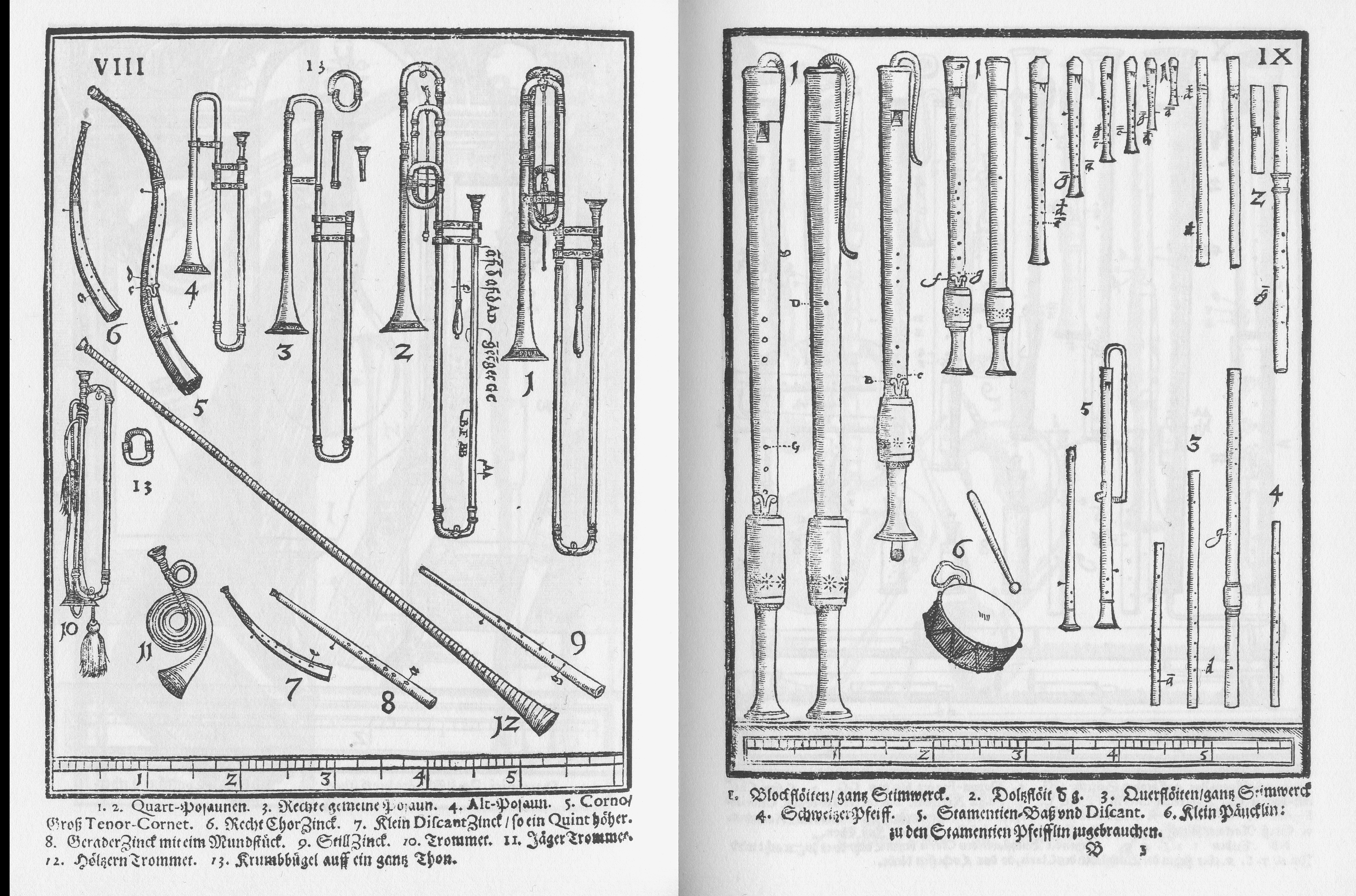 Syntagma Musicum Theatrum Instrumentorum seu Sciagraphia Wolfenbüttel 1620